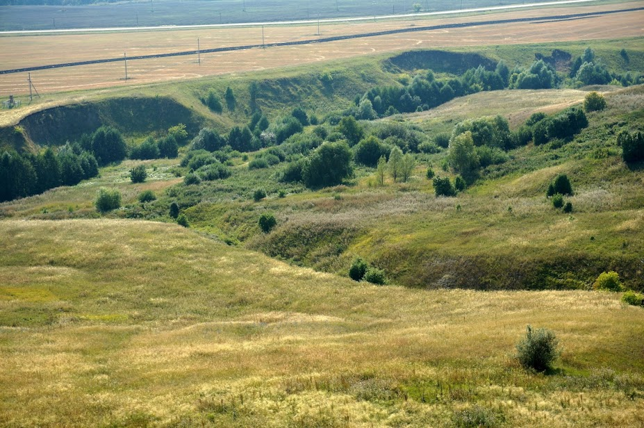 Овраг у подножья холмов на памятнике природы "Подвальские террасы"